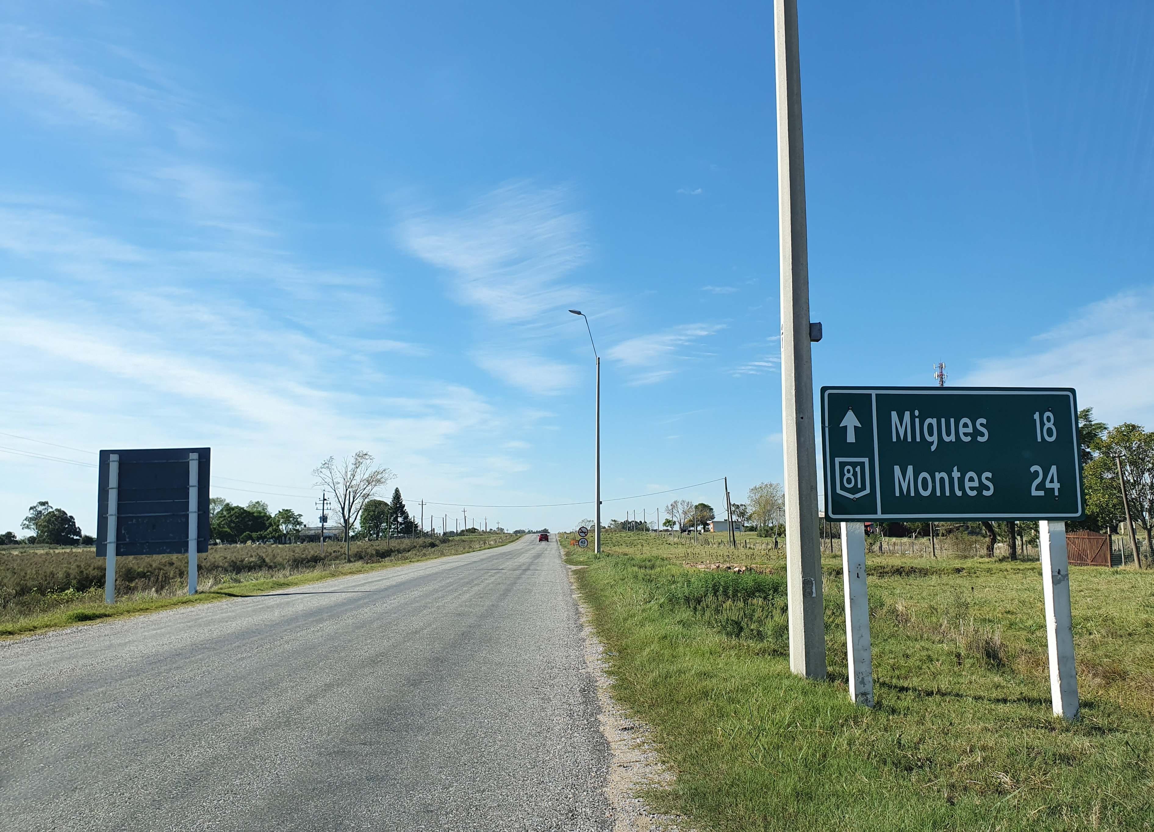 Ruta 81 a la altura del km 55.300, sentido este, próximo al empalme con ruta 7. Departamento de Canelones, Uruguay.